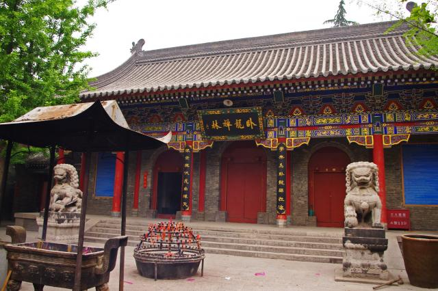 陕西省西安市卧龙寺，陕西最古老的佛教寺庙。